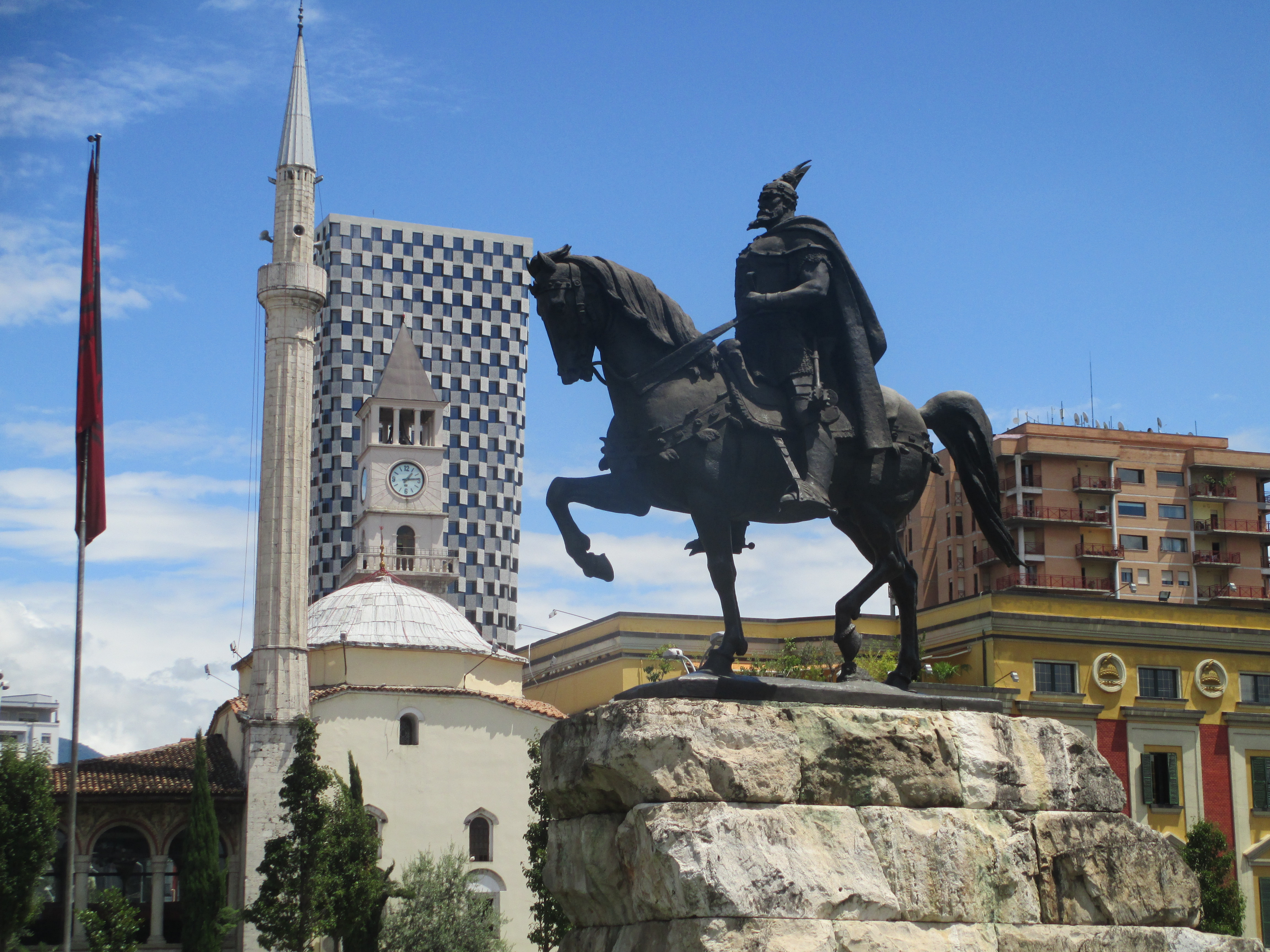 פסל סקנדרבג בטירנה